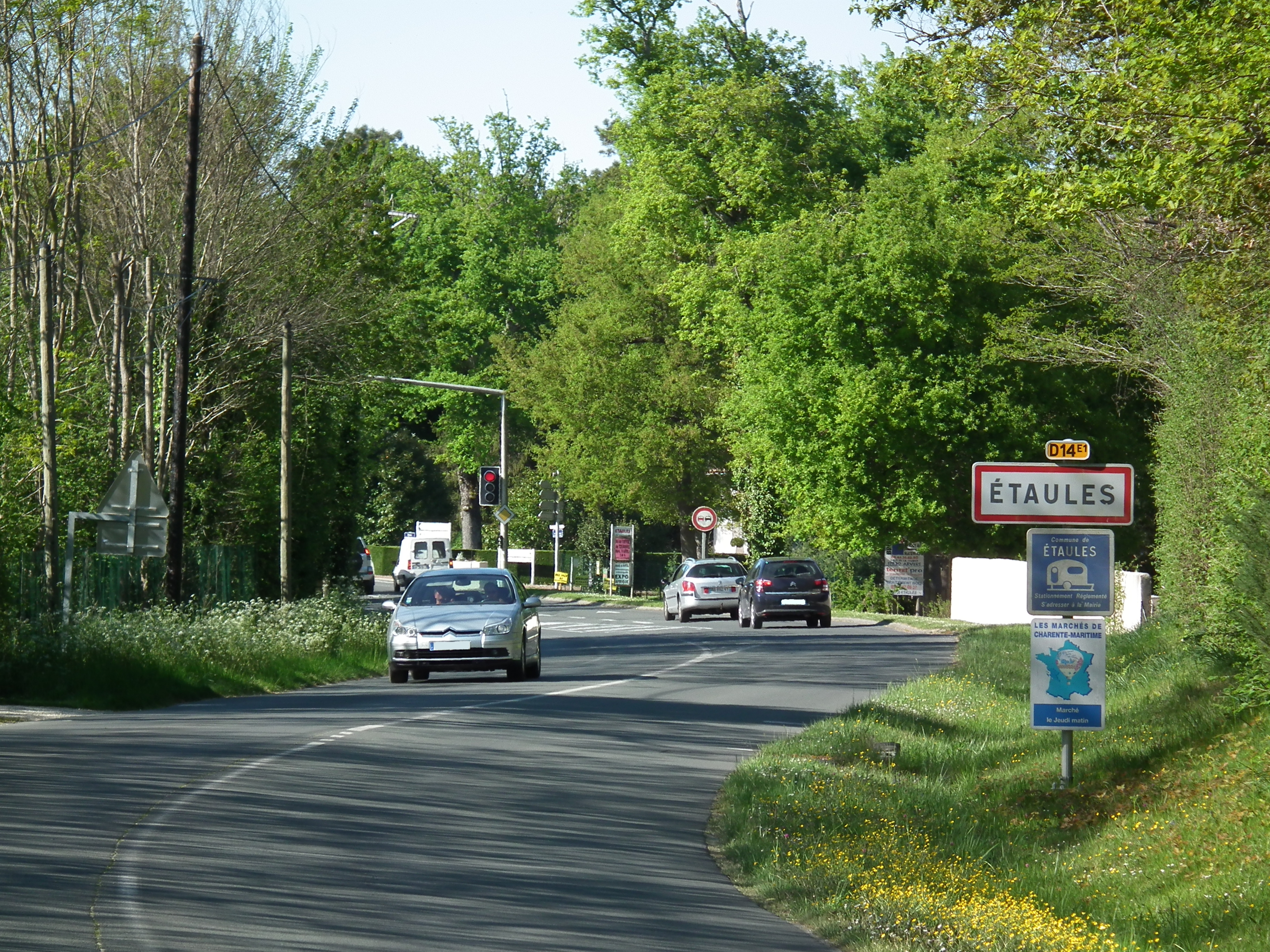 Accès à la ville d'Etaules